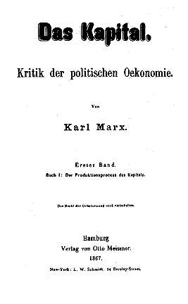 Das Kapital